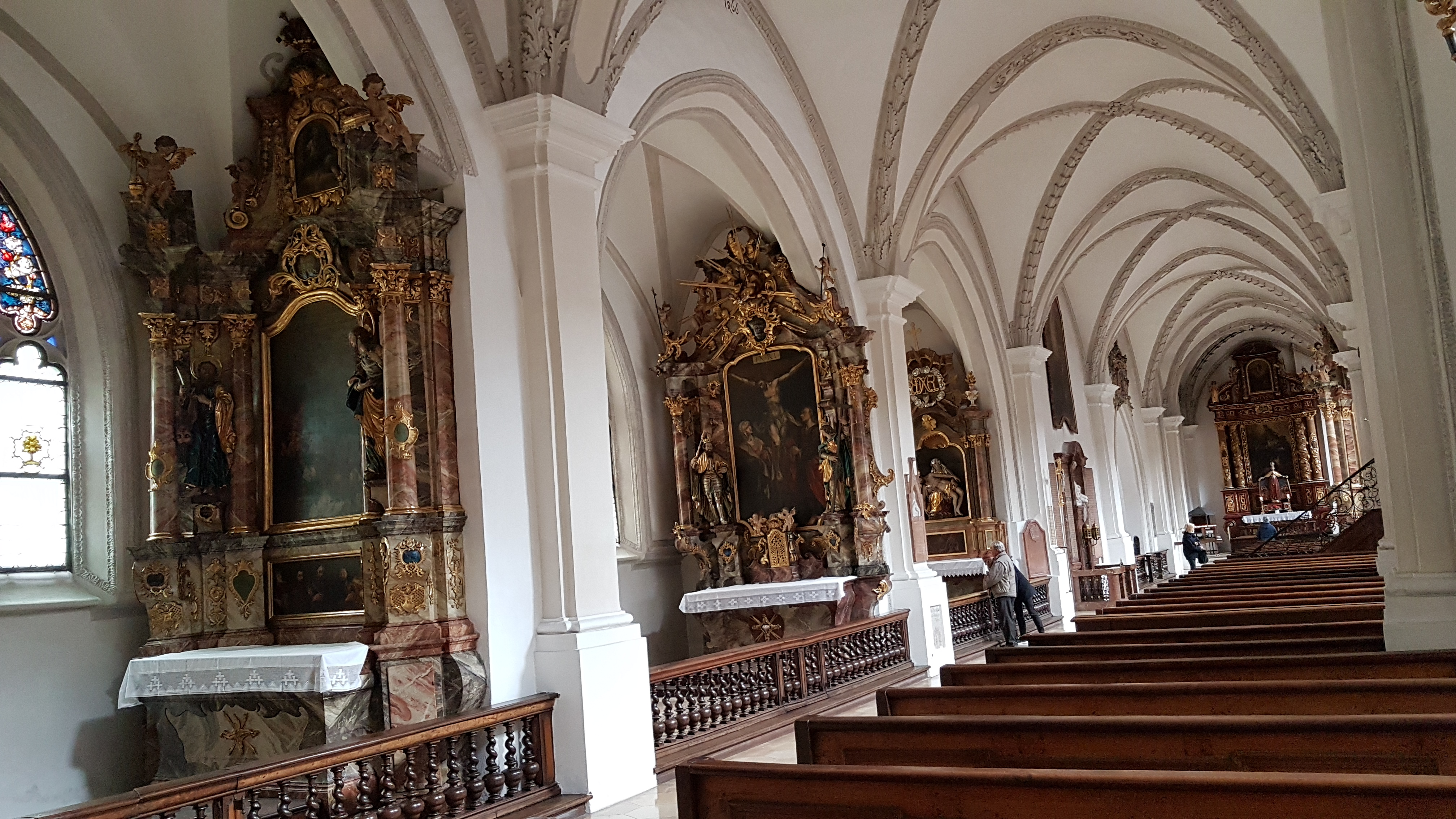 Mariä Himmelfahrt (Landsberg am Lech), Blick durchs linke Seitenschiff und zu den Kapellenaltäre.